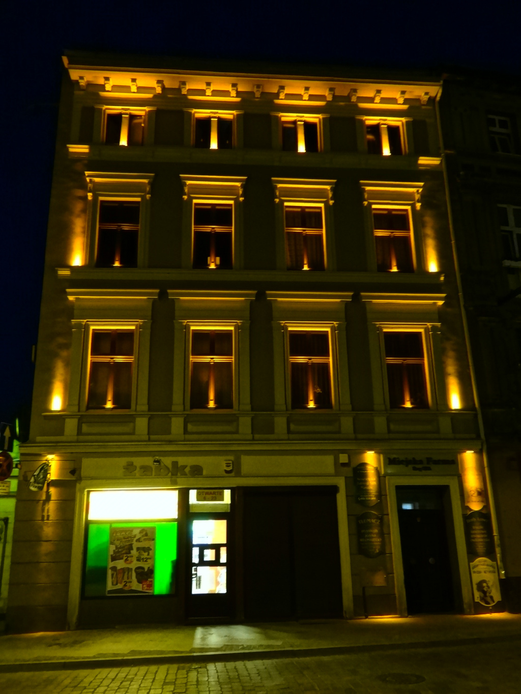 Ulica Podwale 11 w Bydgoszczy